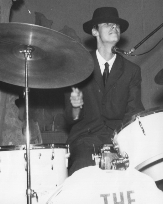 Hasse Walli